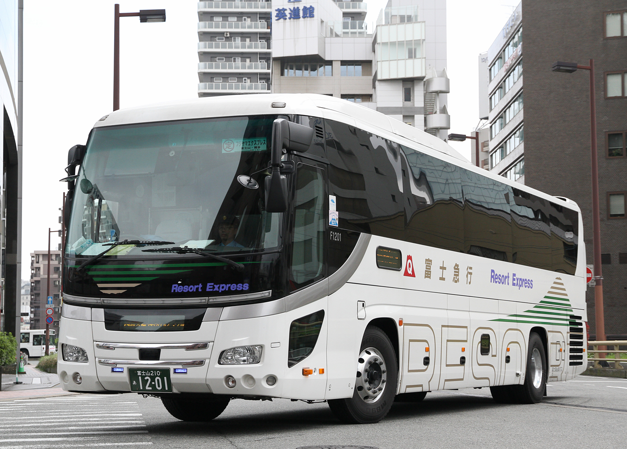 ・登録番号 富士山210あ12-01 ・富士急山梨バス㈱本社営業所所属 ・夜行高速路線用車両 ・2014年8月17日 福岡市中央区にて撮影 ・撮影者 Zondag2000